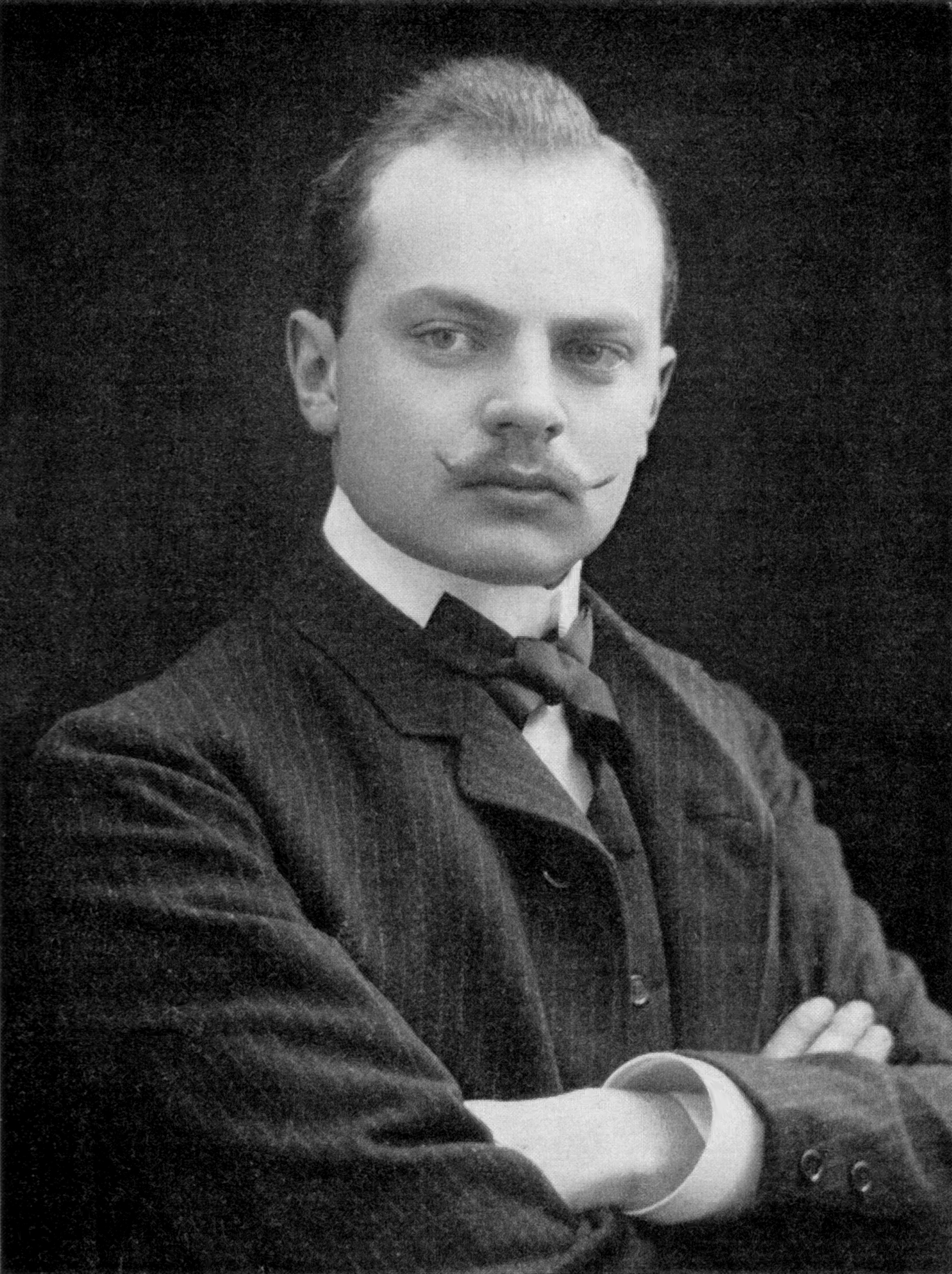 Otto Järte